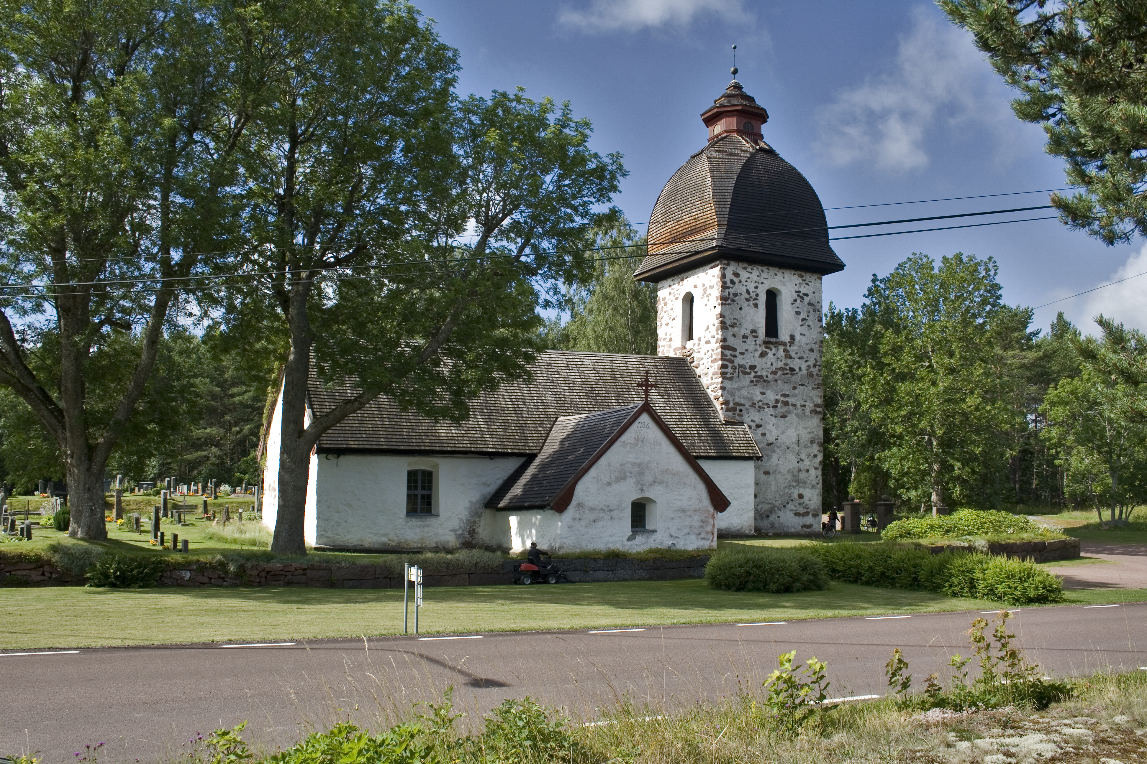 Vårdön kirkko 07.2016